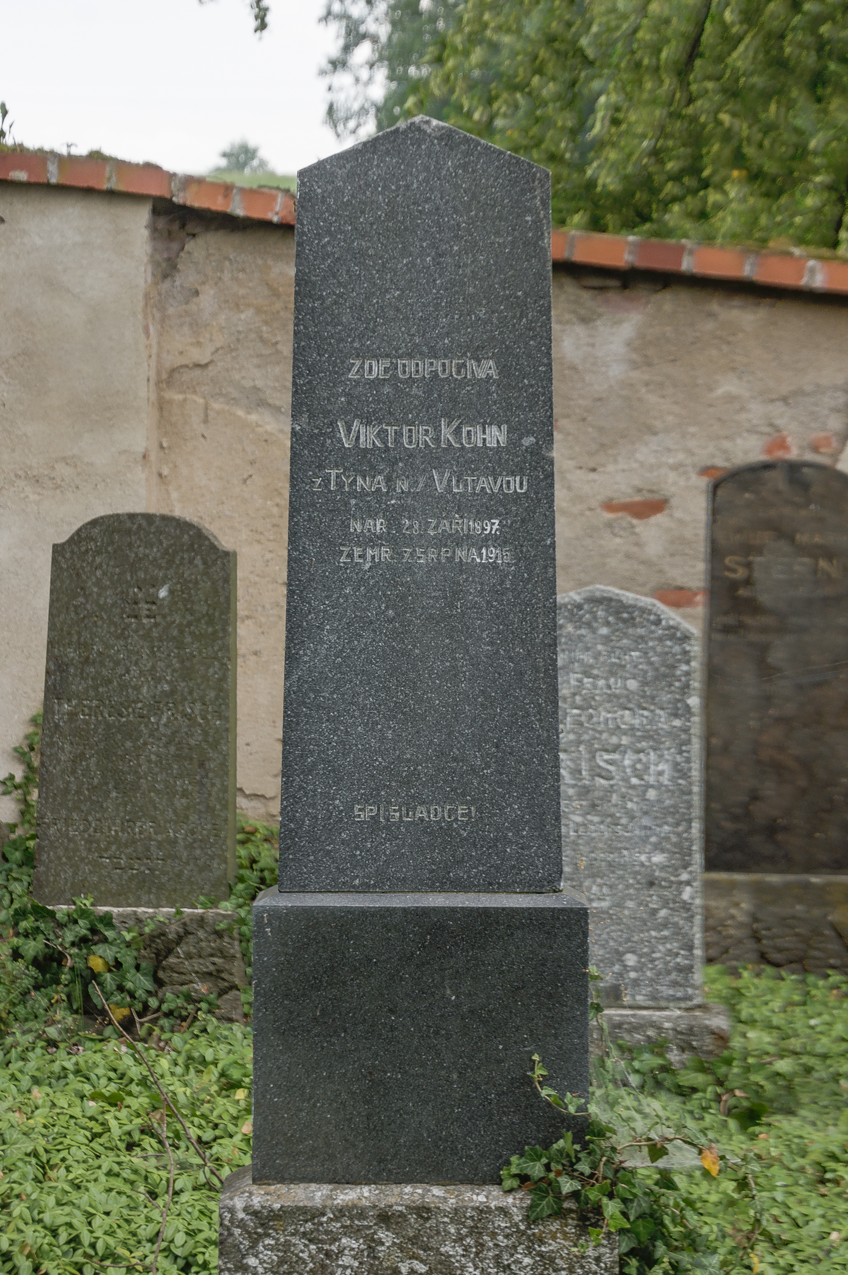 Hrob Viktora Kohna